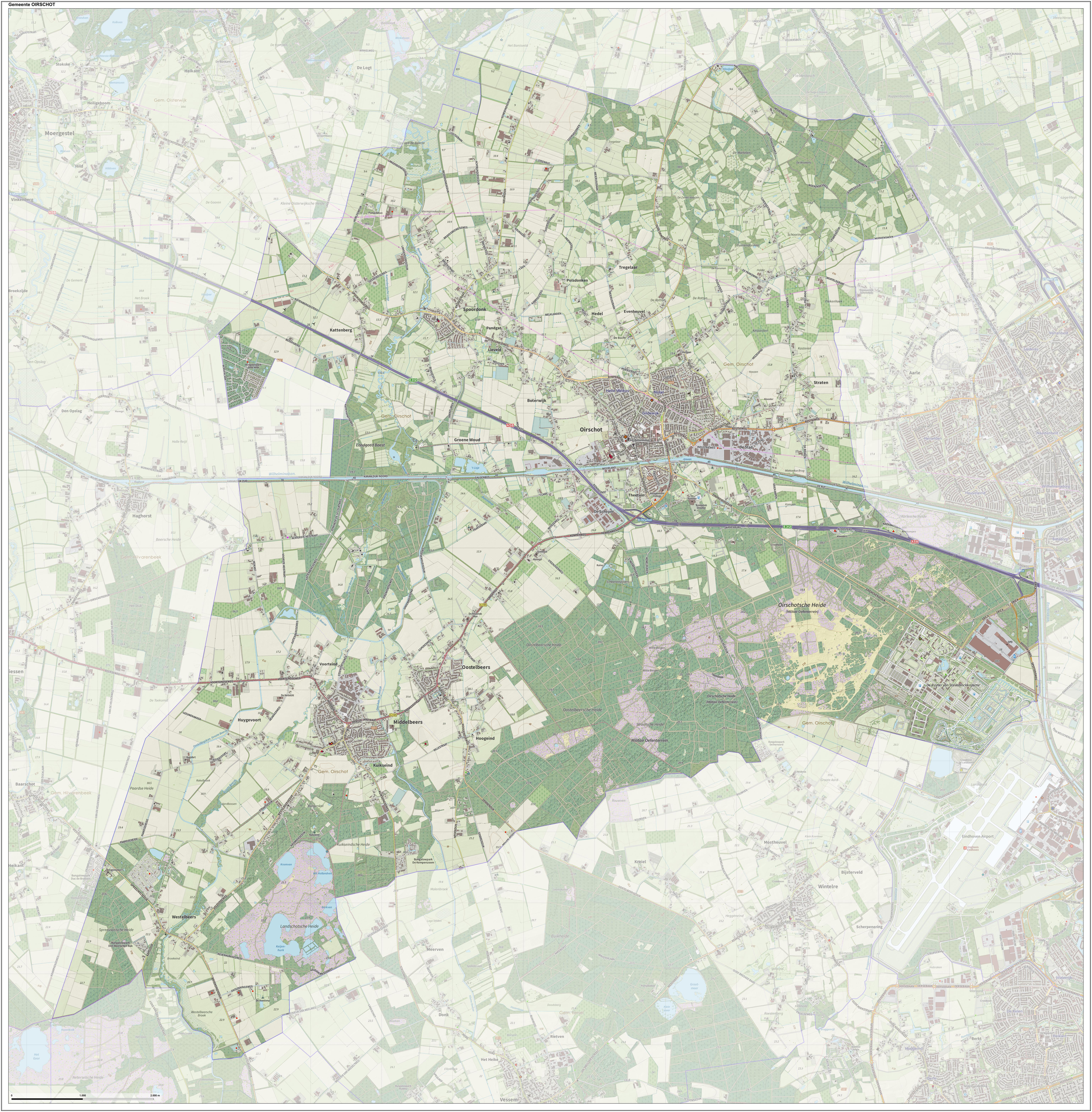 Topografische gemeentekaart. Resolutie: 400 pixels/km. Kaartbeeld samengesteld uit de open geodata van de Top10NL en Top25namen (Kadaster), Creative Commons-BY licentie. Gebouwvlakken uit open geodata BAG extract. Wegen uit de OpenStreetMap, OpenStreetMap community. Reliëfschaduw uit de Actuele Hoogtekaart AHN2. Samenstelling en kleurenschema: Jan-Willem van Aalst, met QGIS. Zie ook de Legenda.